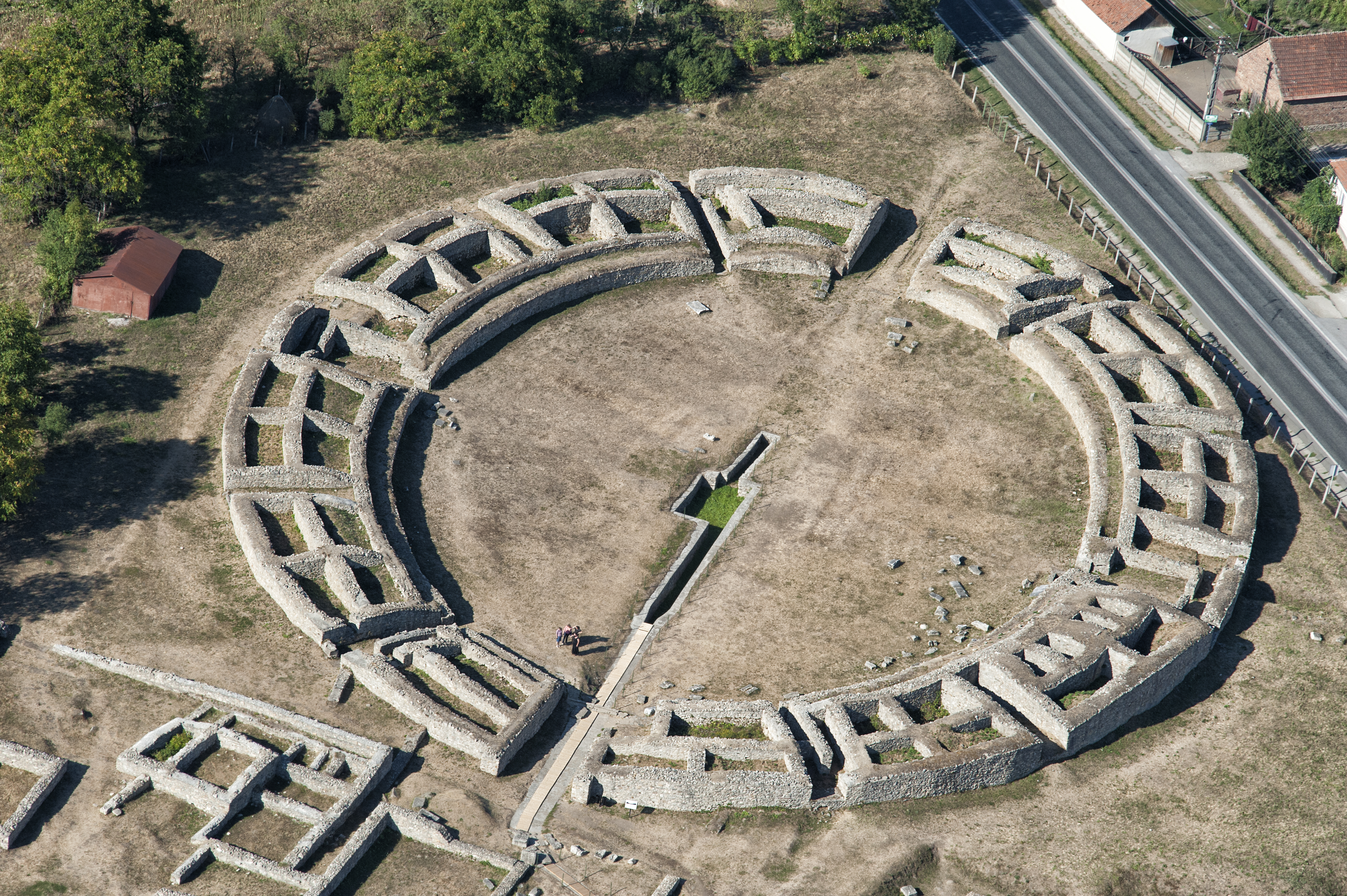 Colonia Ulpia Traiana Sarmizegetusa - vedere aeriana